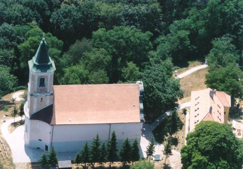 Homokkomárom, Hungary, aerialphotography. Kisboldogasszony római katolikus templom